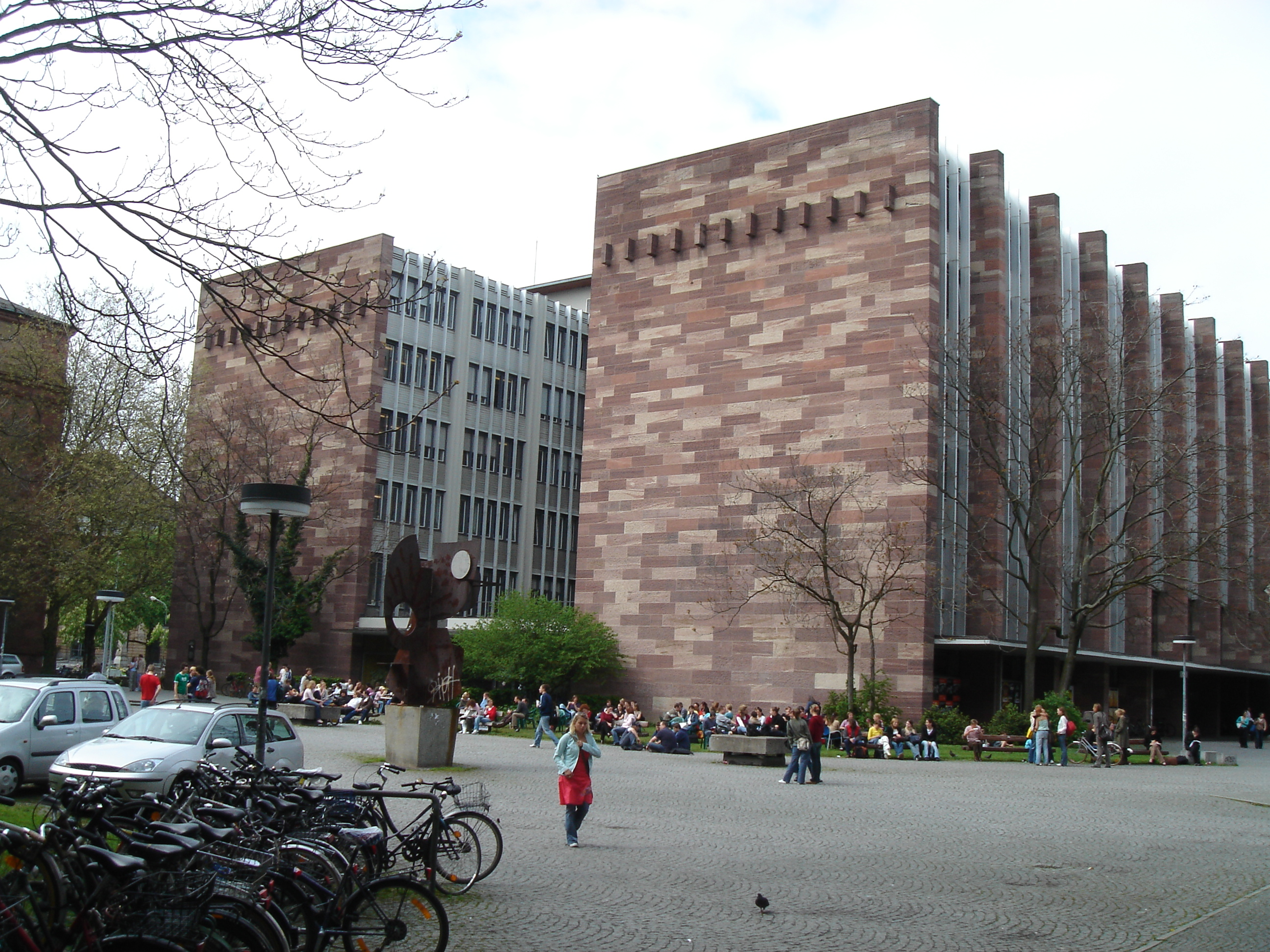 Kollegiengebäude II der Universität Freiburg (Jura, VWL) mit Platz der Weißen Rose